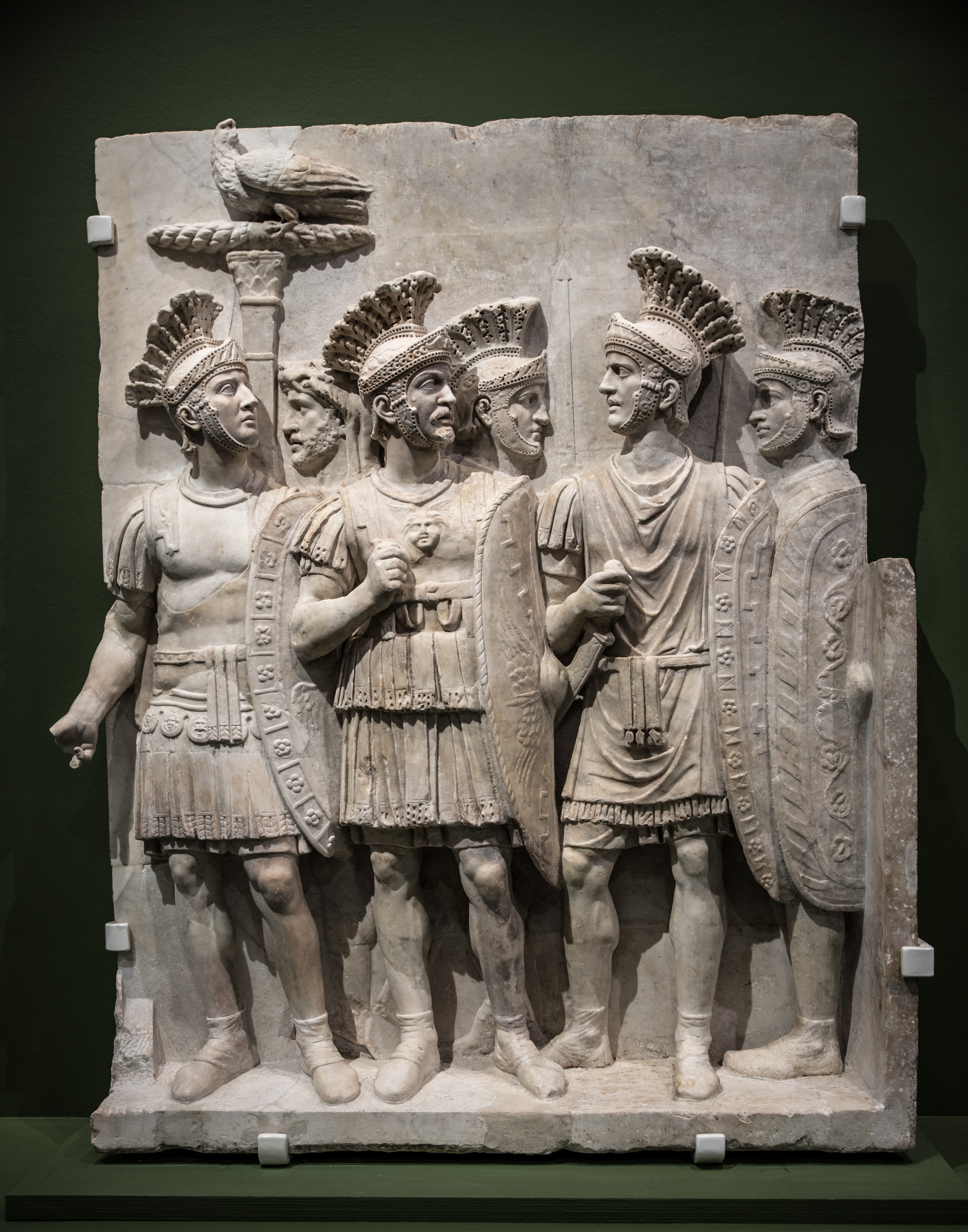 Claude, un empereur au destin singulier - Exposition au musée des Beaux-Arts de Lyon - 2018